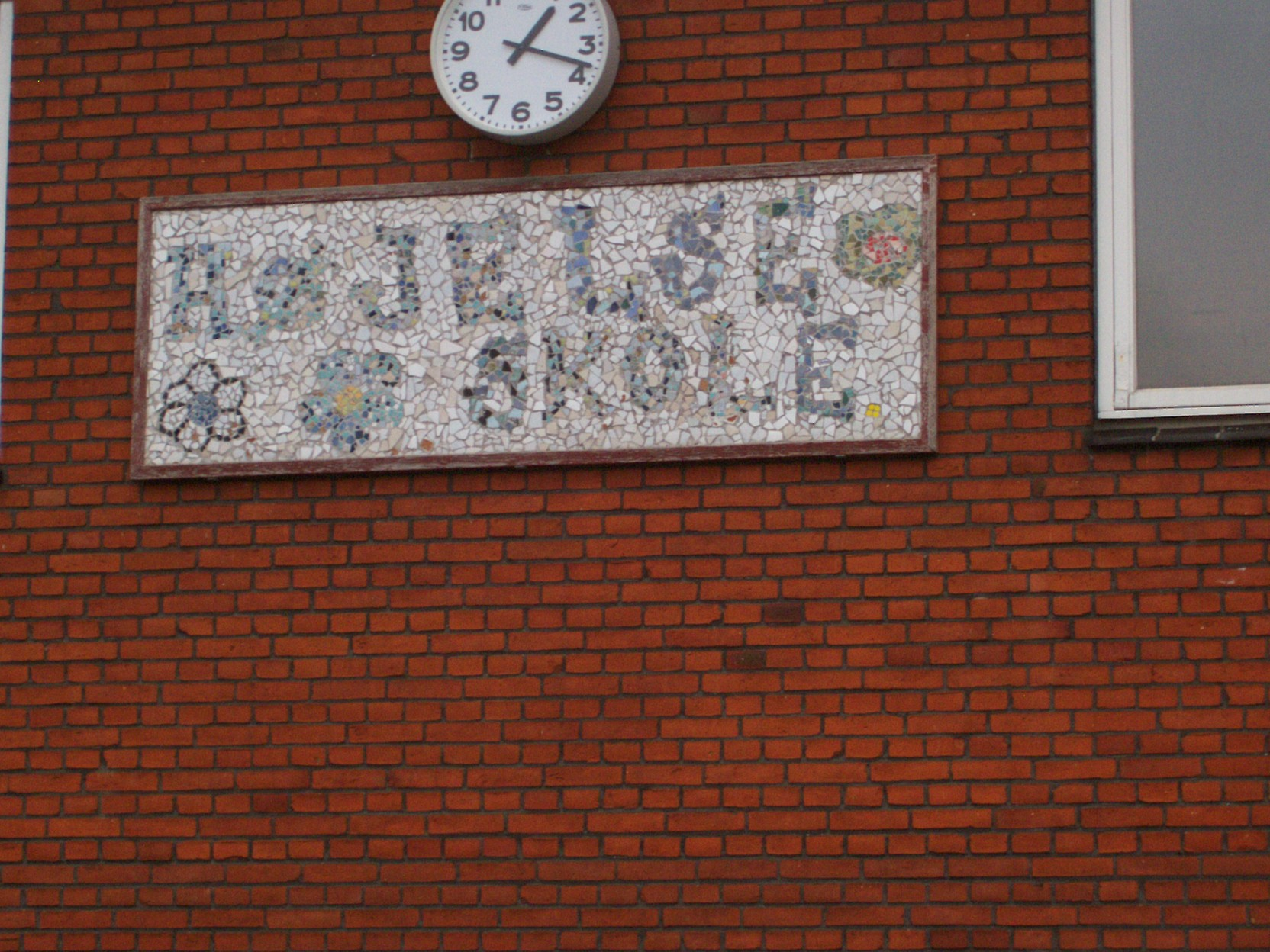 Mosaik med Højelse Skole, set i skolens skolegård 2013.